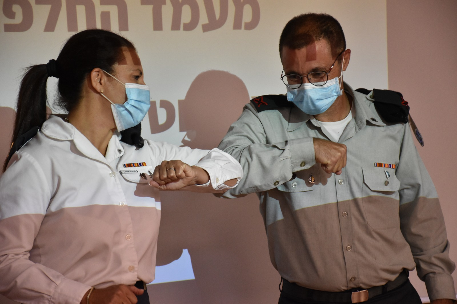 מיכל תשובה העבירה את תפקיד ראש חטיבת הסגל למחליפה תא"ל יוסי מצליח וסיימה את שירותה הפעיל בצה"ל